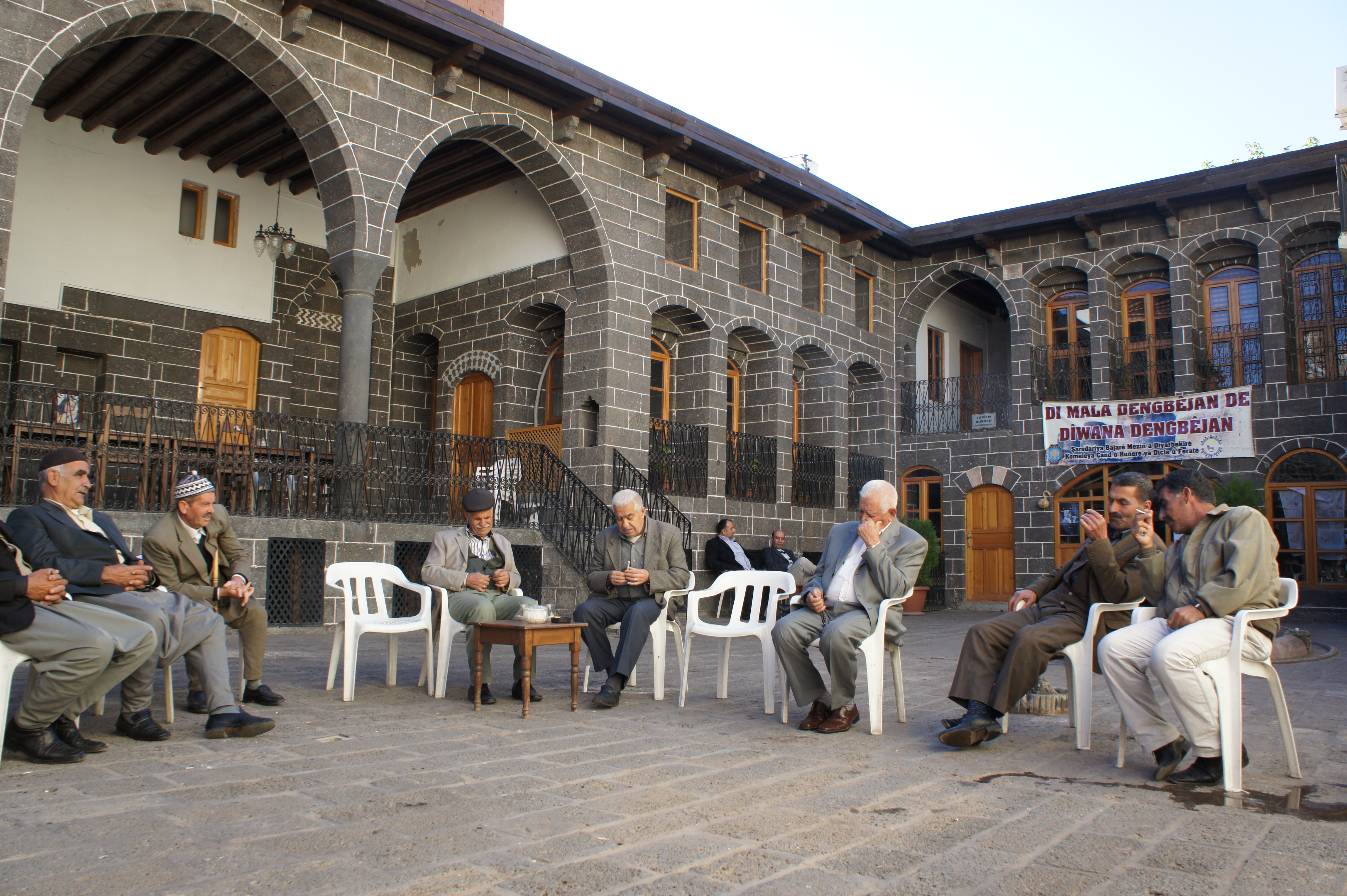 Kurdî: Mala Dengbêjan, Amed.